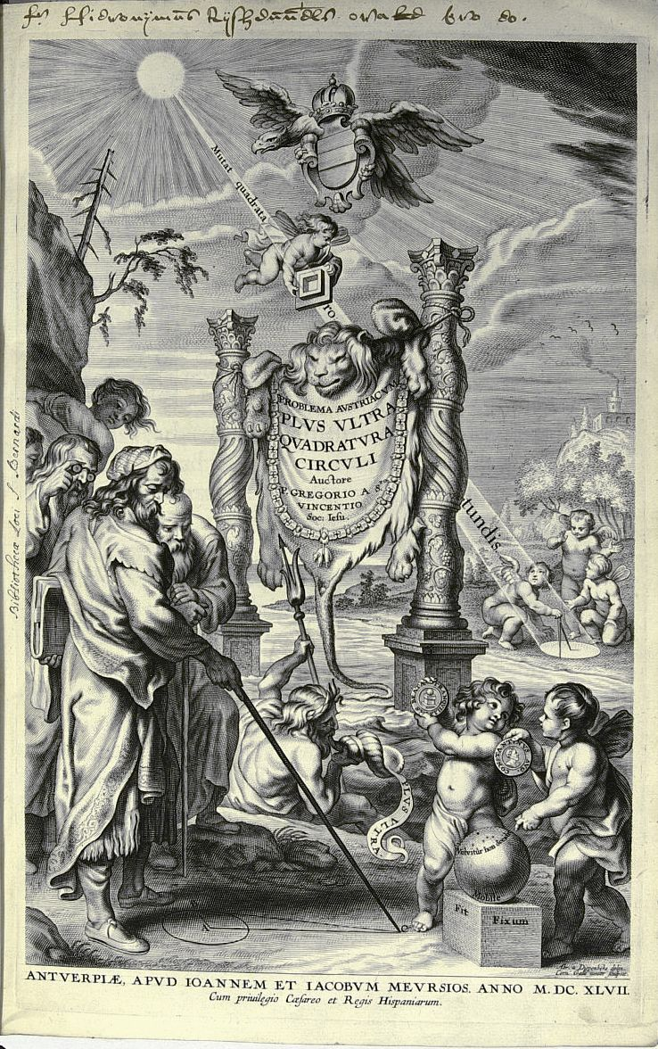 Titelpagina van Gregorius a Sancto Vincentio, Opus geometricum quadraturae circuli et sectionum coni, decem libris comprehensum. getekend door Abraham van Diepenbeke en gegraveerd door Cornelis Galle